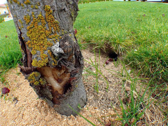 Árbol con la corteza roída por los topillos campesinos, al fondo una de sus madrigueras